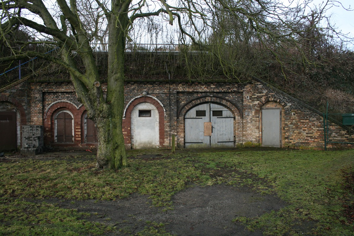 Magdeburg Kavalier 4